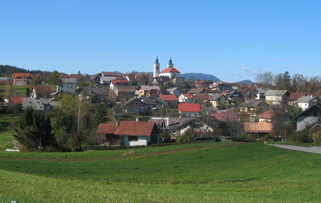 Velike Lašče, town in Slovenia photo:Ziga 14:17, 30 October 2006 (UTC)